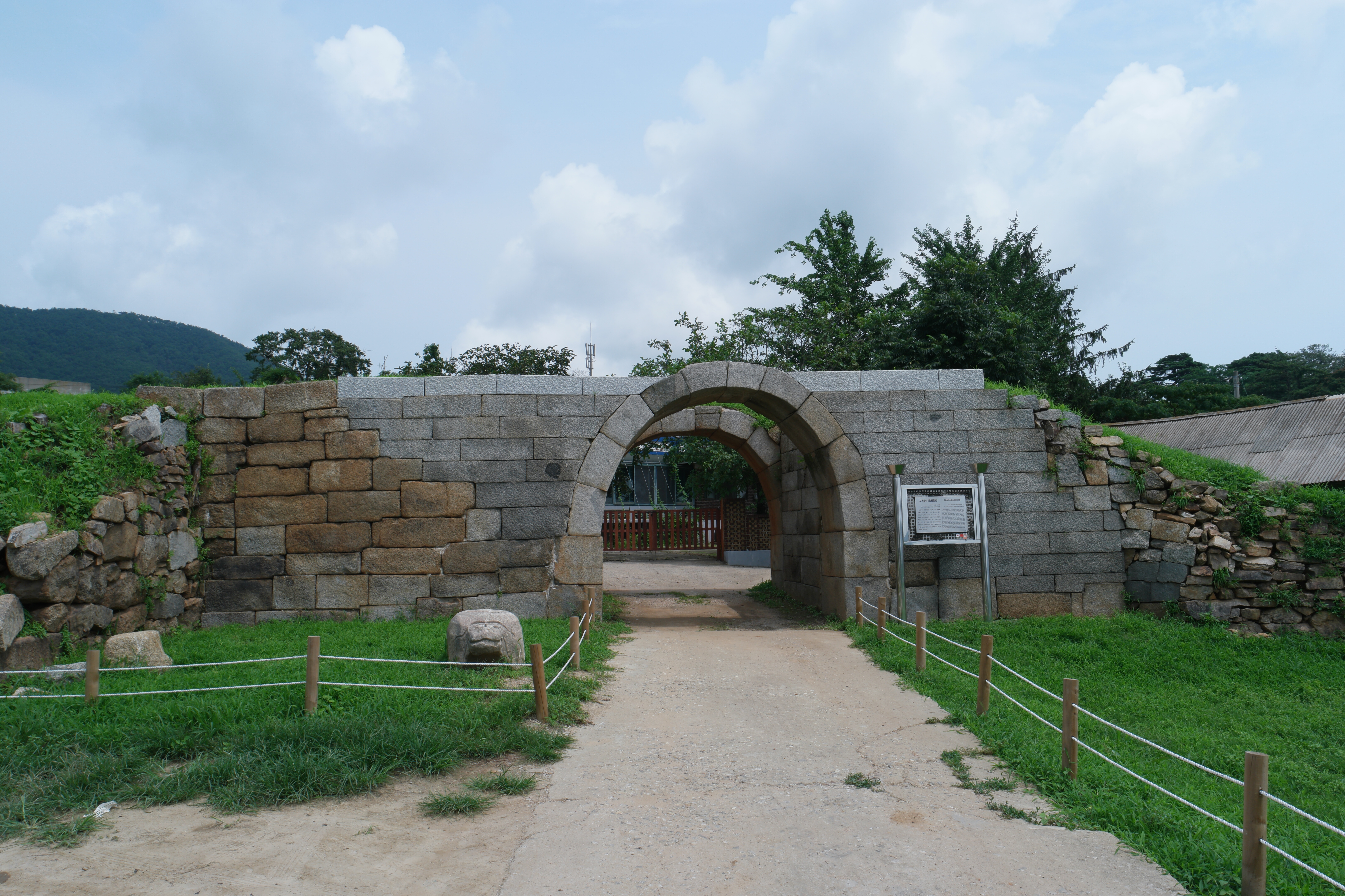 교동읍성 (인천광역시 기념물 제23호)